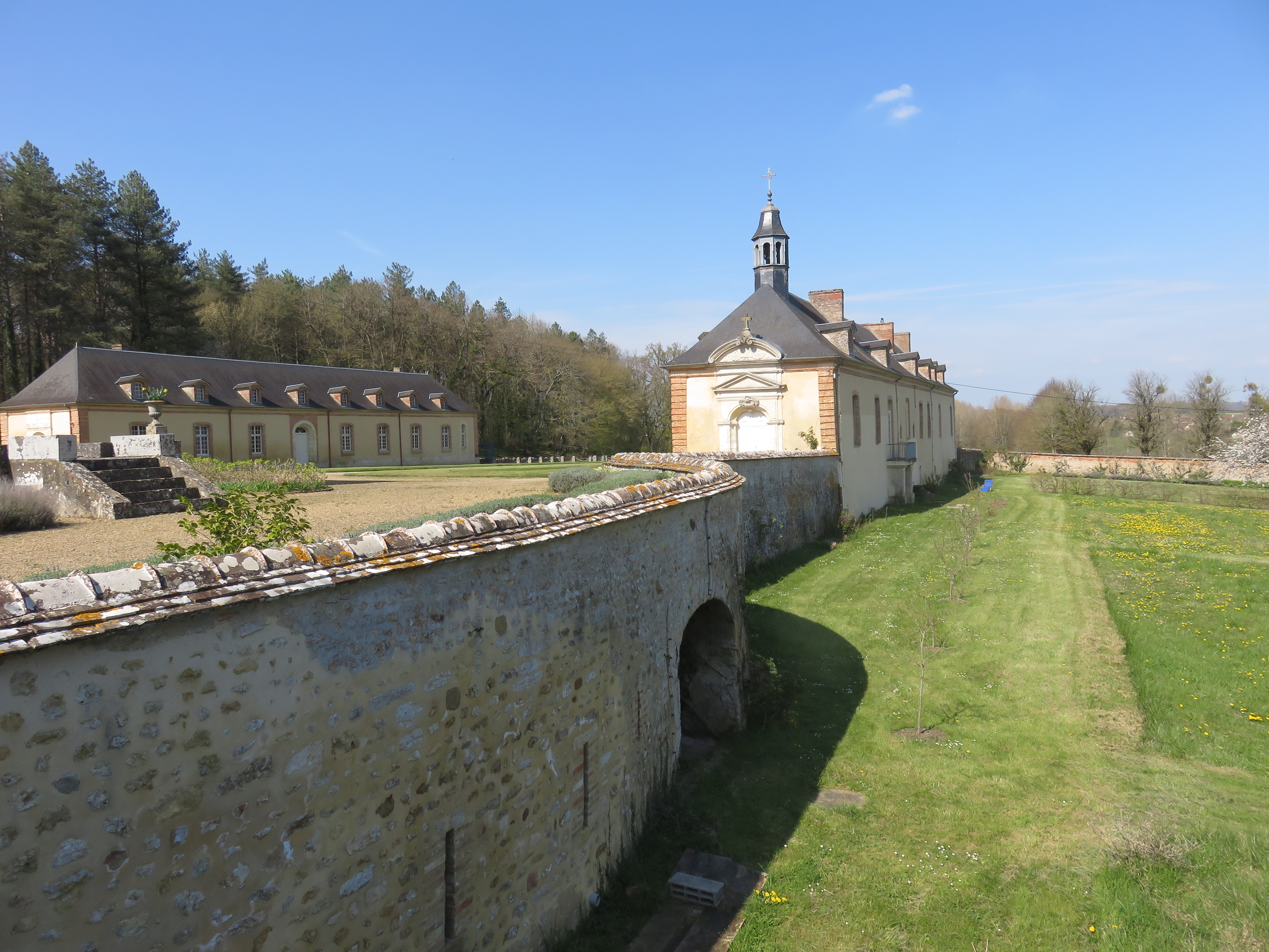 Château de Chèreperrine (61) les communs et les douves sèches (XVIII e siècle)